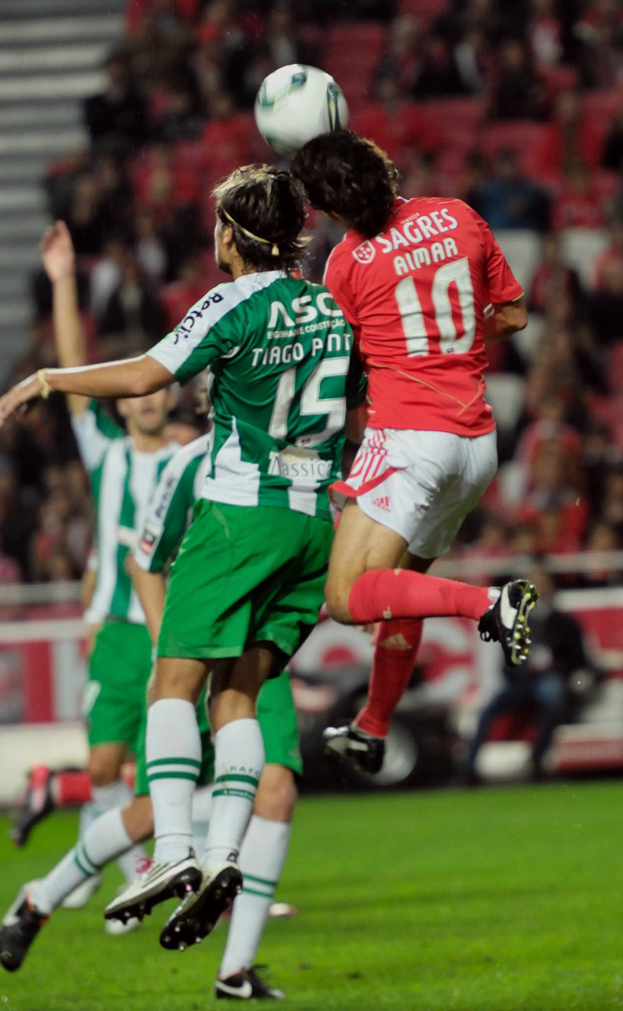 Pablo Aimar e Tiago Pinto